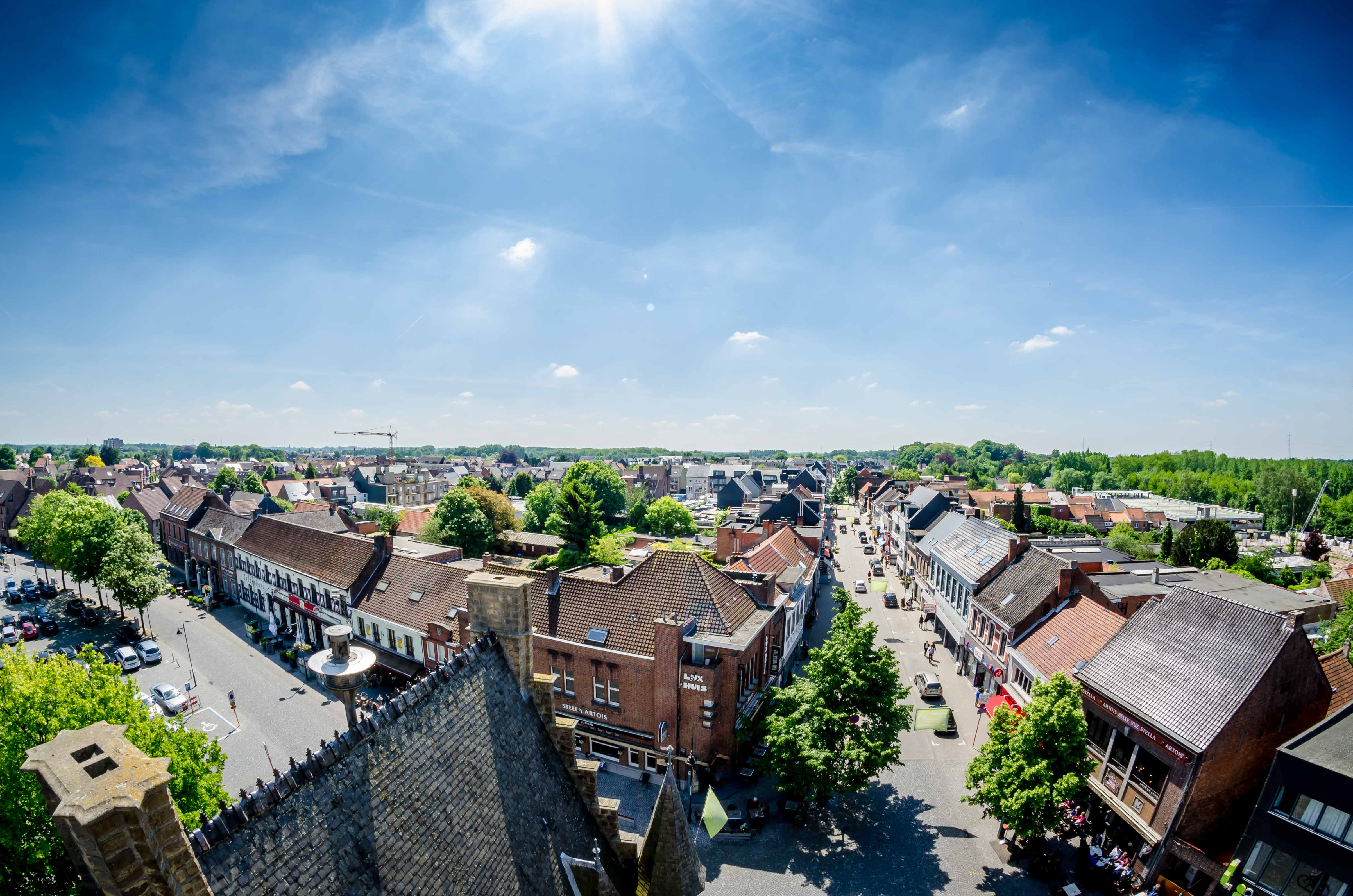 Samen met de gemeenten Puurs en Sint-Amands vormt Bornem de streek Klein-Brabant. De gemeente telt ruim 20.000 inwoners. Bovenaanzicht vanuit de toren van het oude gemeentehuis.